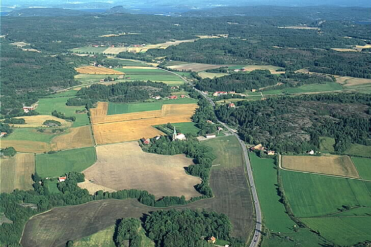 Flygbild där Bokenäs nya kyrka, vit byggnad med torn, framförallt syns. (UDDEVALLA BÖN 1:15 - husnr 3) Området har flertalet fornlämningar men framförallt flera lämningar av en boplats, Sten-/Bronsålder. Inget som man direkt ser på bilden dock. Motiv: Bokenäs Nyckelord: Flygbilder, Riksintressen Kategori: Miljöer, Odlingslandskap Flygbild där Bokenäs nya kyrka, vit byggnad med torn, framförallt syns. (UDDEVALLA BÖN 1:15 - husnr 3) Området har flertalet fornlämningar men framförallt flera lämningar av en boplats, Sten-/Bronsålder. Inget som man direkt ser på bilden dock.